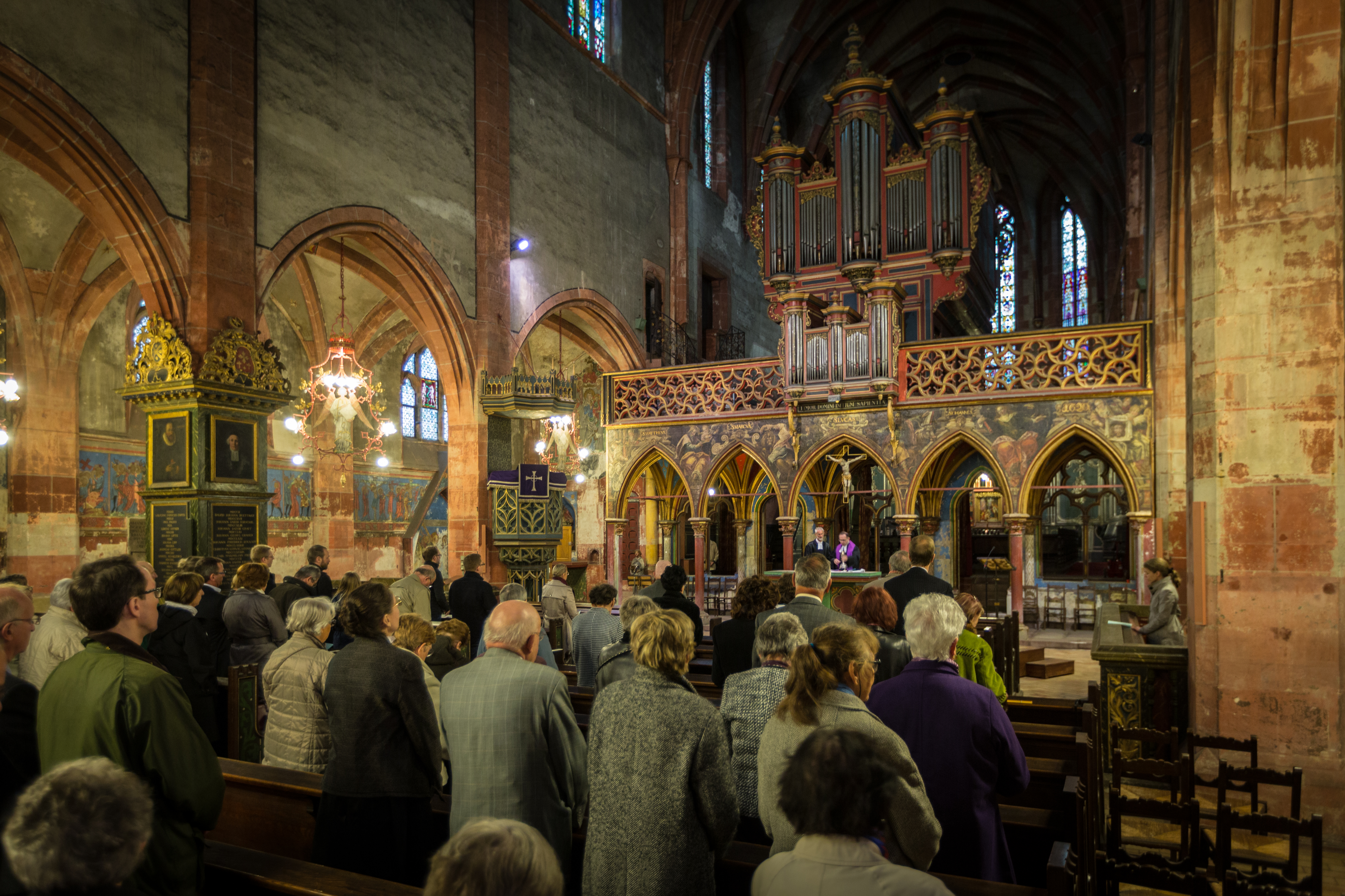 Culte de Sainte Cène église protestante Saint-Pierre-le-Jeune Strasbourg 18 avril 2014 avec les pasteurs Philippe Eber et Eric Schiffer.